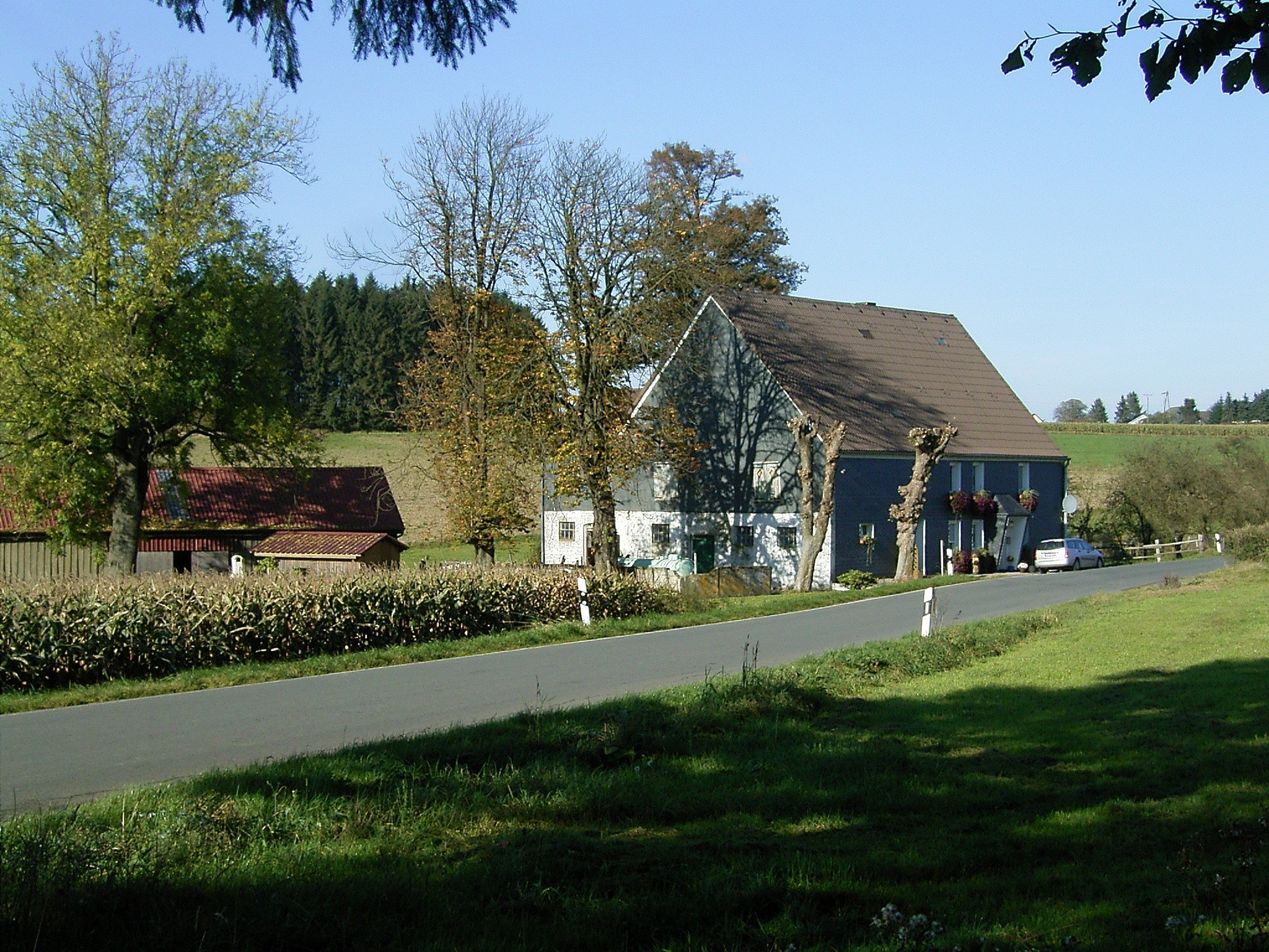 Radevormwald